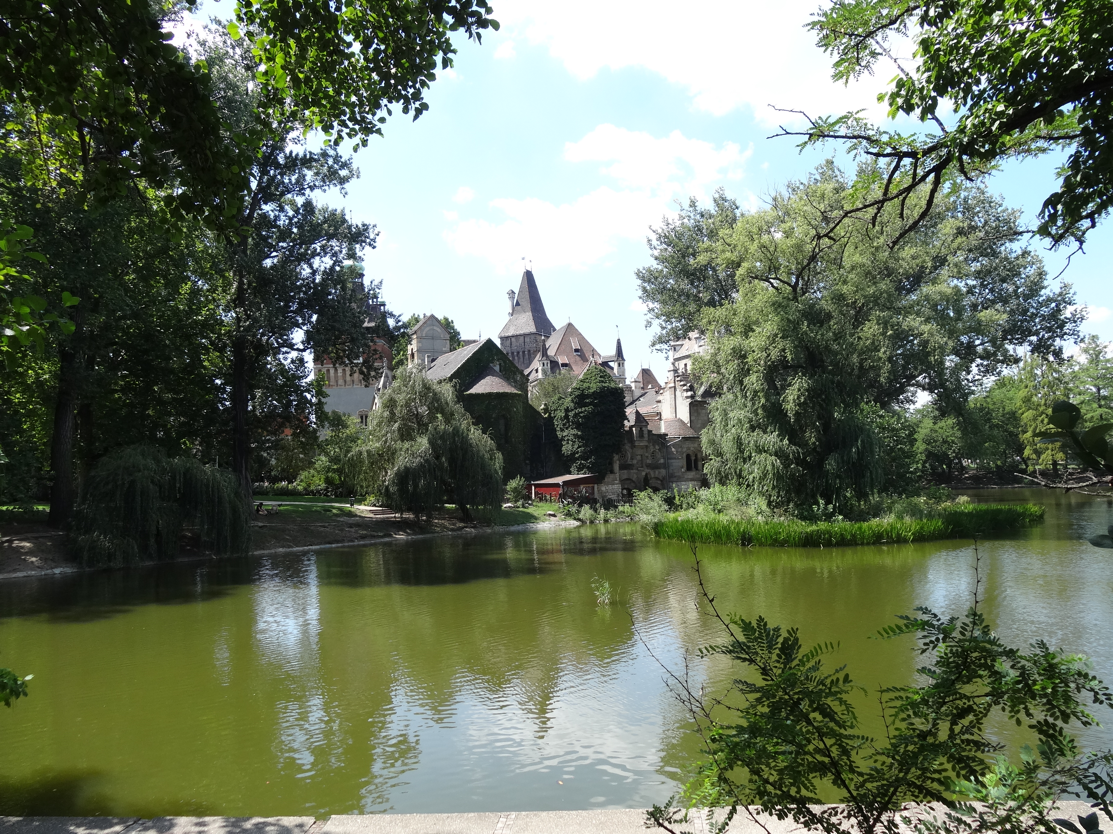 Budapest (agost 2012)